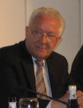 El profesor Ciriaco Morón Arroyo en una conferencia en Trujillo, España, 25 de mayo de 2007.